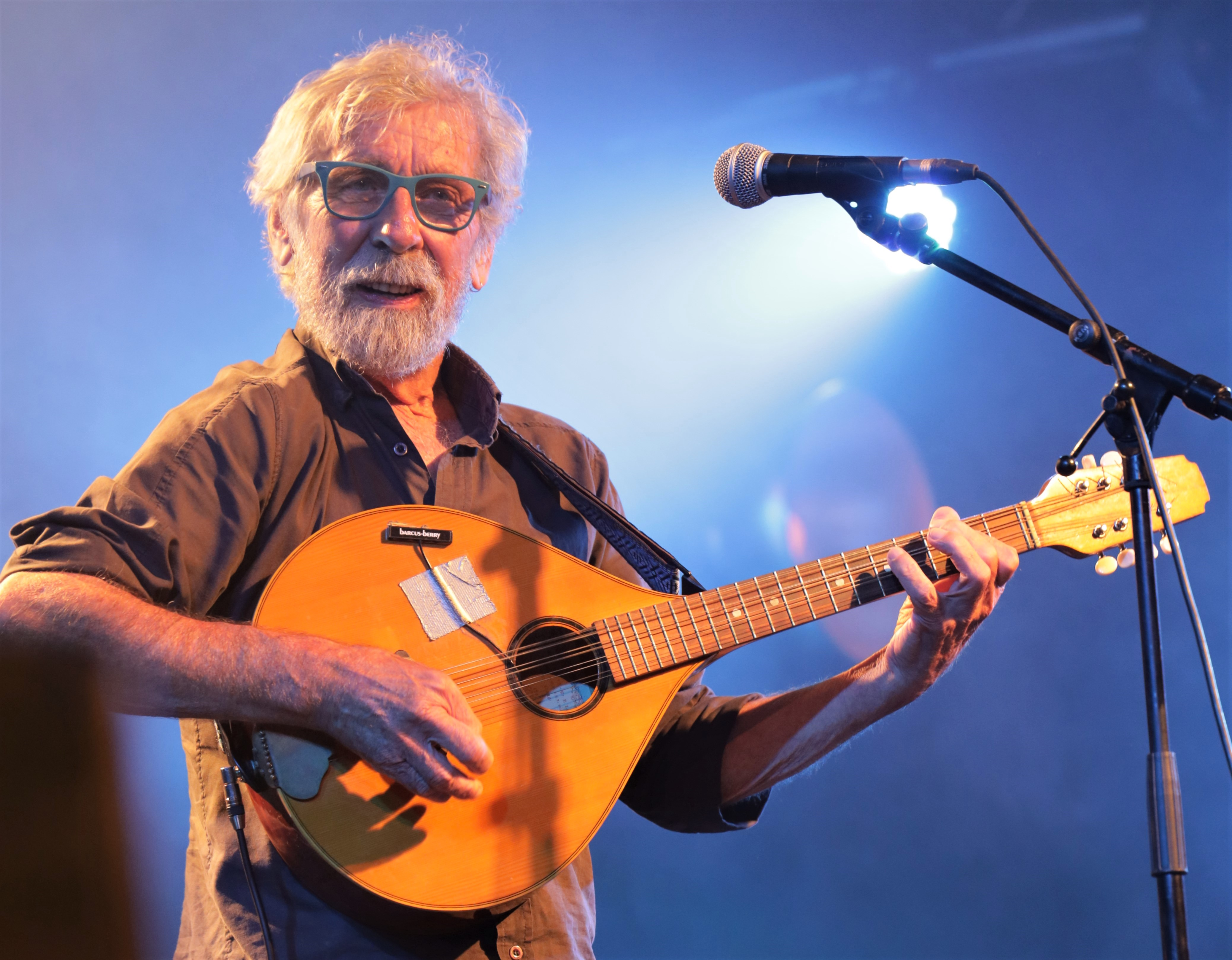 Concert de Djiboudjep pendant le Festival Interceltique Lorient 2019